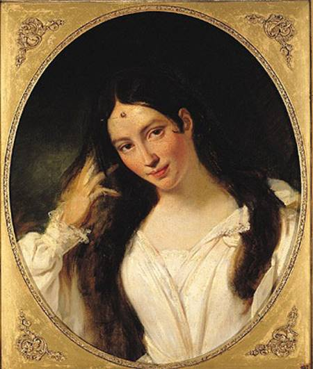 Portrait par François Bouchot (1800-1842) de la célèbre cantatrice Maria Malibran, dite "La Malibran", (1808-1836) que chanta Alfred de Musset dans des Stances célèbres. Elle est représentée dans le rôle de Desdémone qu'elle interprèta en 1834, dans l'Othello de Rossini.